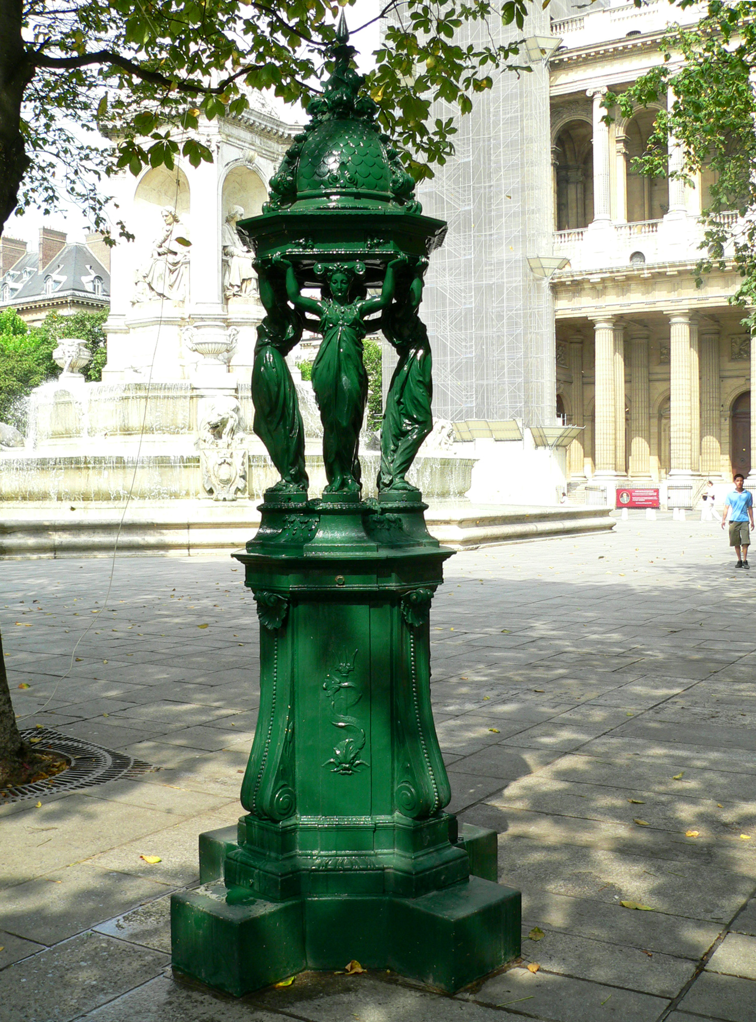 Fontaine Wallace Place Saint-Sulpice, VIe arrondissement, Paris